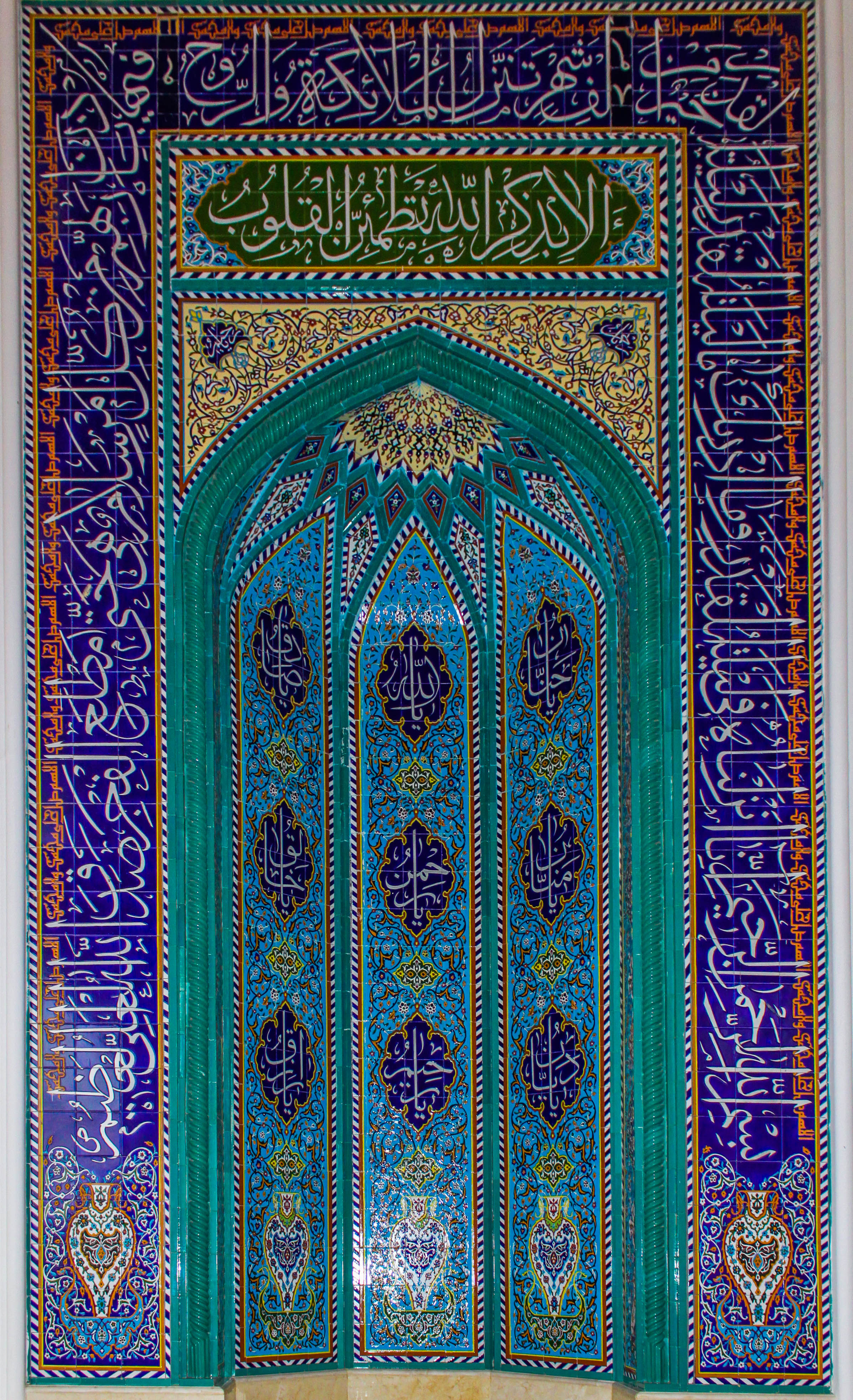 Gəncə İmamzadə məscidinin mehrabı